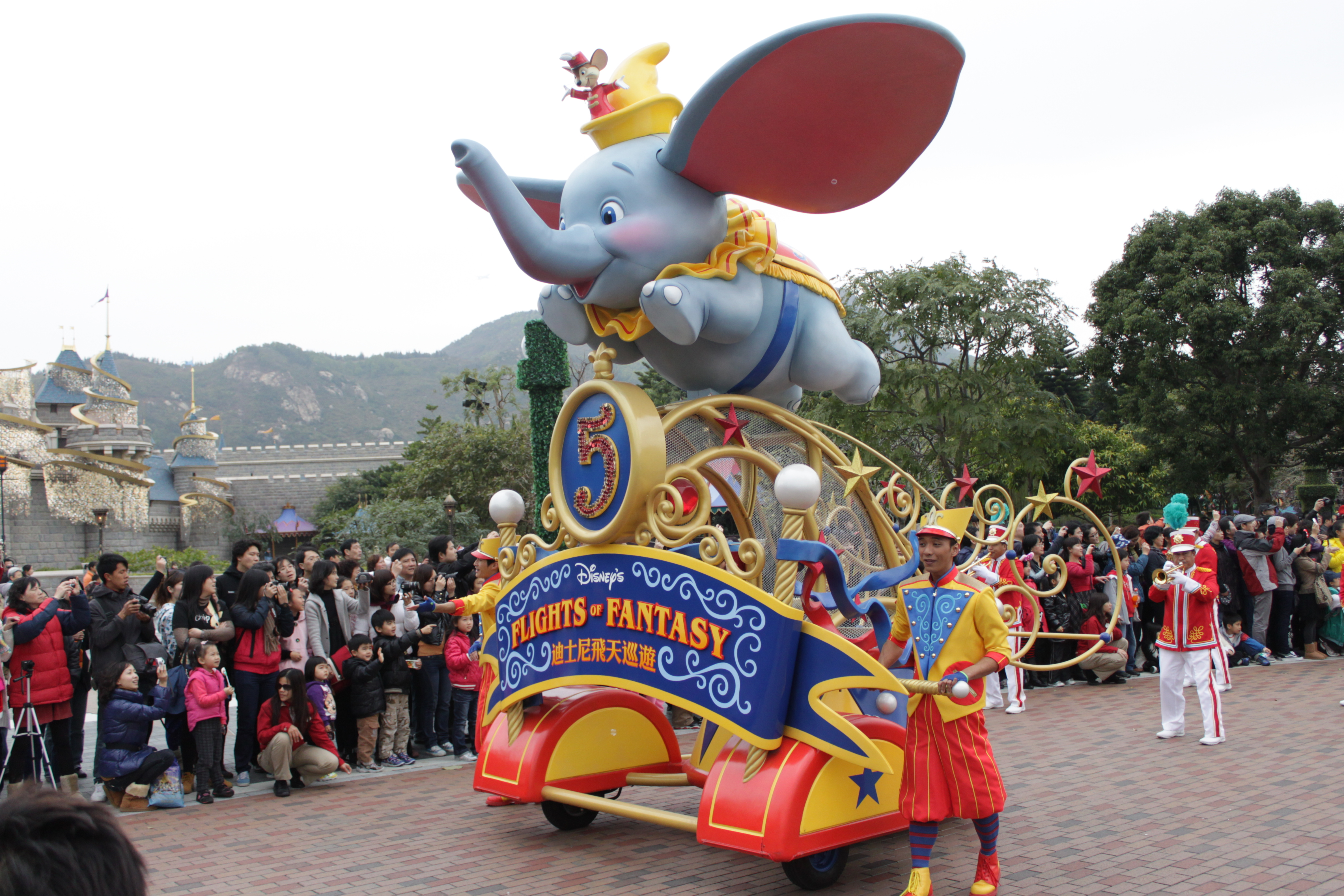 中文（香港）: 香港迪士尼樂園「迪士尼飛天巡遊」的首輛花車